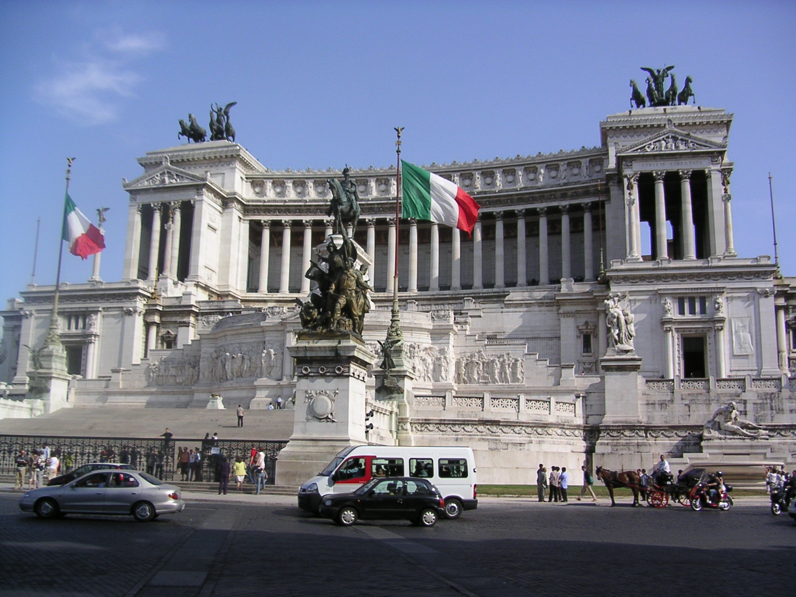 Foto:Jimmy Engelbrecht